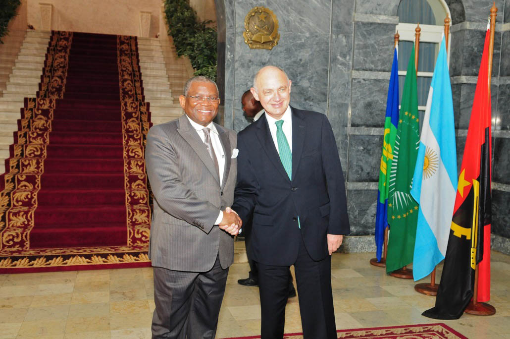 Luanda, Angola, marzo 5 de 2012. El Canciller Héctor Timerman fue recibido por su par angoleño, Georges Rebelo Pinto Chikoty, en el marco de la misión comercial argentina a ese país africano.